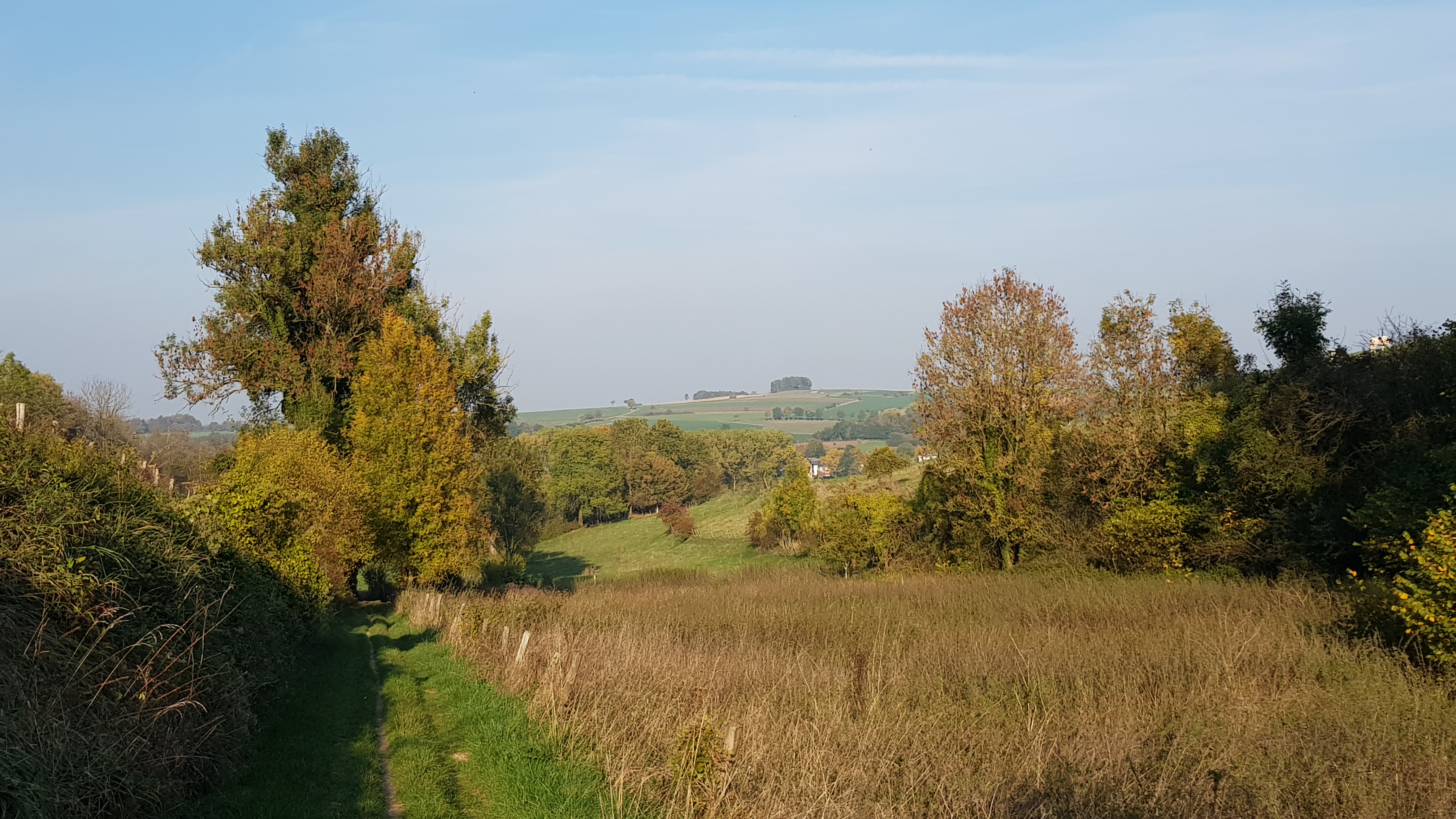 Gronzedelle, Stokhem, Gulpen-Wittem, Nederland